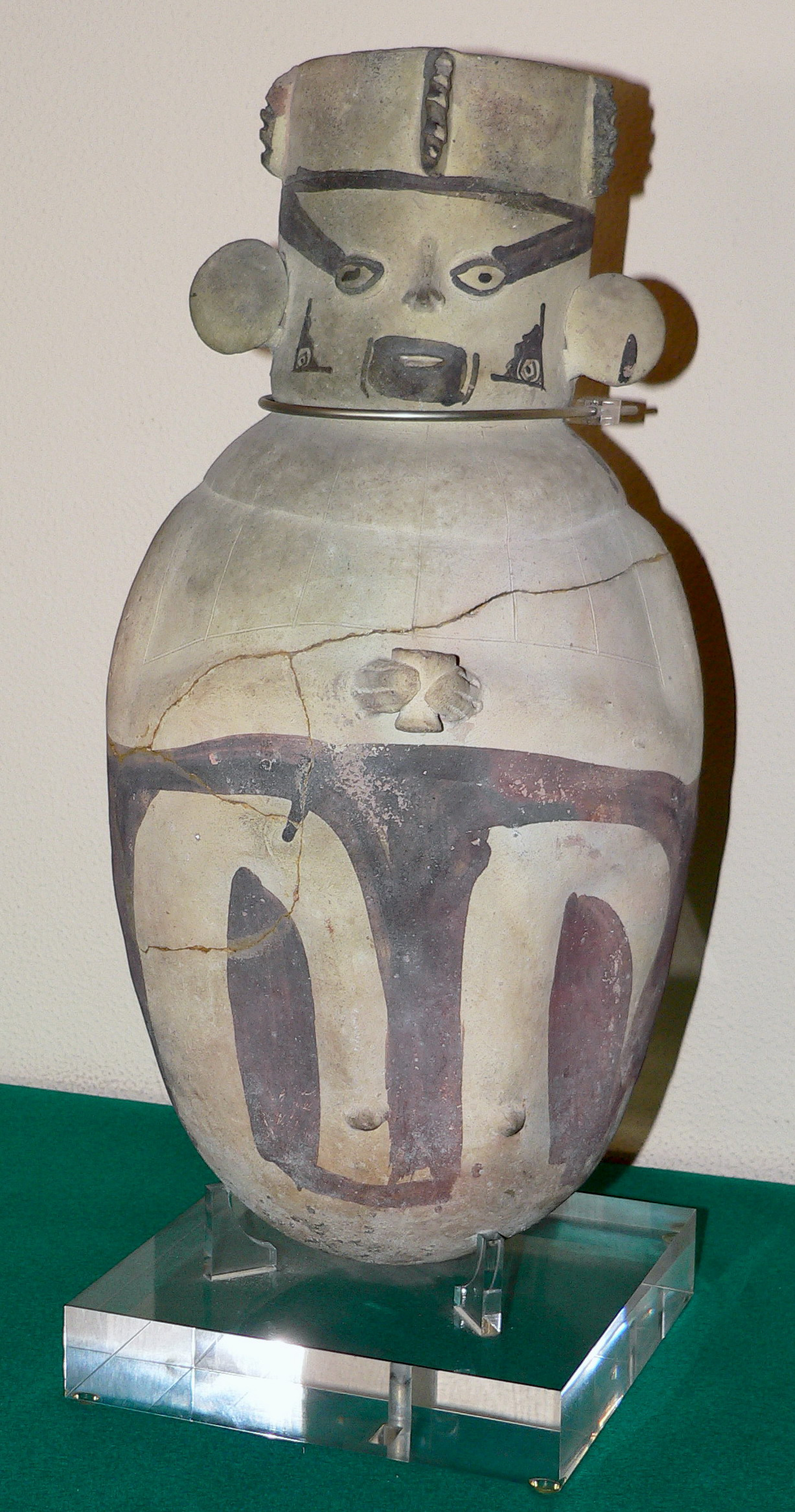 Descripción: Cántaro de barro Antigüedad: Entre 1.200 y 1.470 d.C Cultura: Cultura Chancay País : Perú Fotógrafo: © Manuel González Olaechea y Franco Fecha de la foto : 25 de abril de 2008